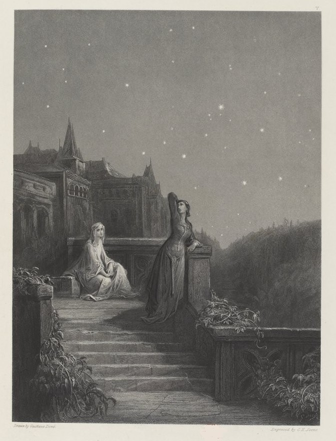 "La Reine alors se prit à penser de nouveau: «Cette enfant va-t-elle me tuer avec son bavardage»", dessin de Gustave Doré pour illustration du poéme "Genièvre" de Alfred Tennyson